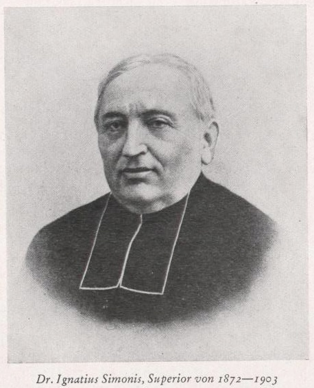 Jakob Ignatius Simonis (1831-1903), elsässischer Priester und deutscher Reichstagsabgeordneter, Superior der Niederbronner Schwestern